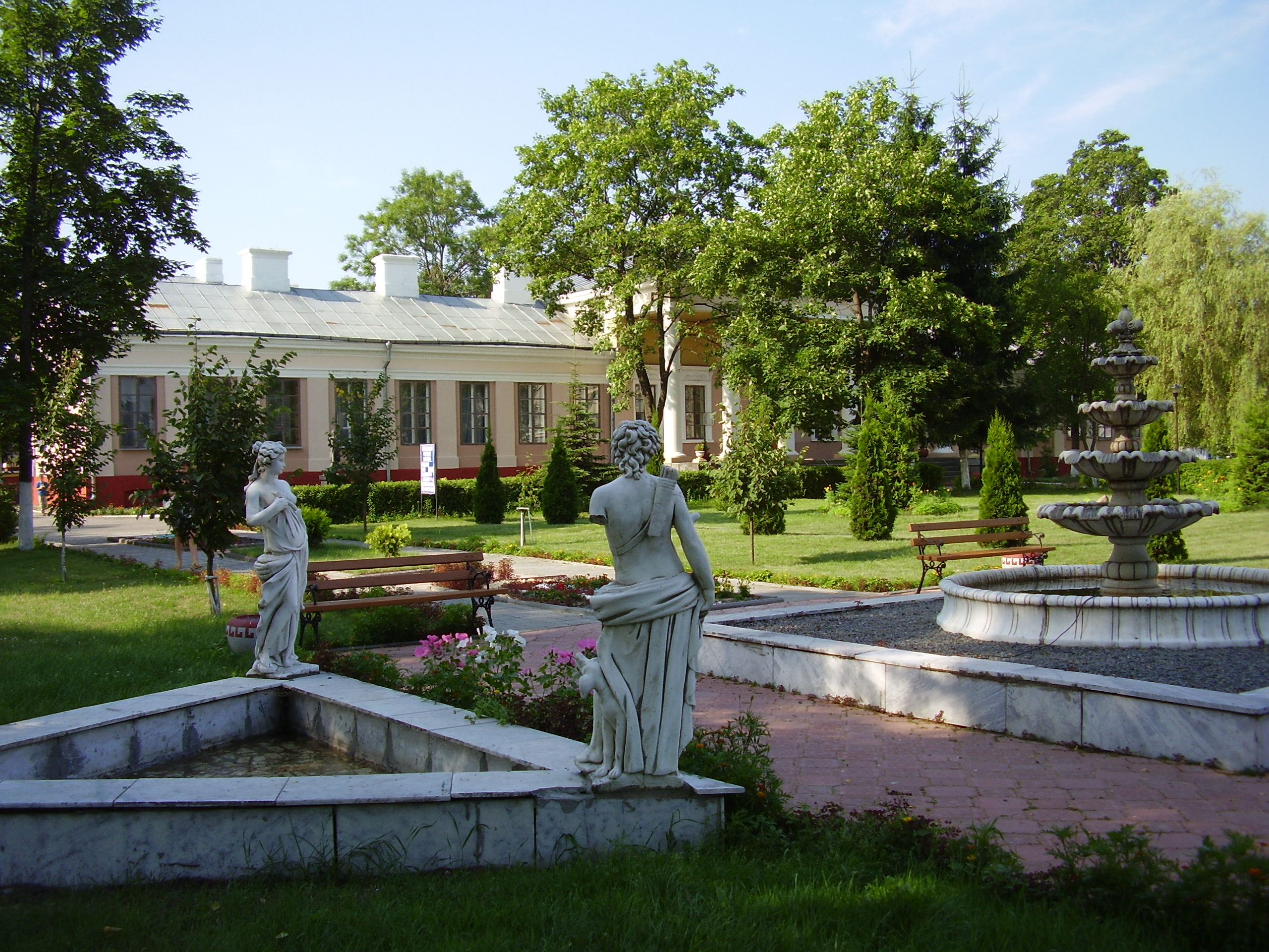 Беларуская (тарашкевіца): Будынак былога палаца Тызэнгаўзаў. г. Паставы